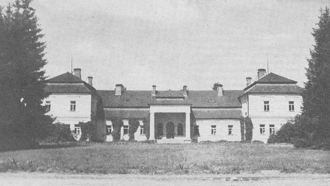 Беларуская (тарашкевіца): Опса (Opsa), сядзіба Плятэраў (Plater)